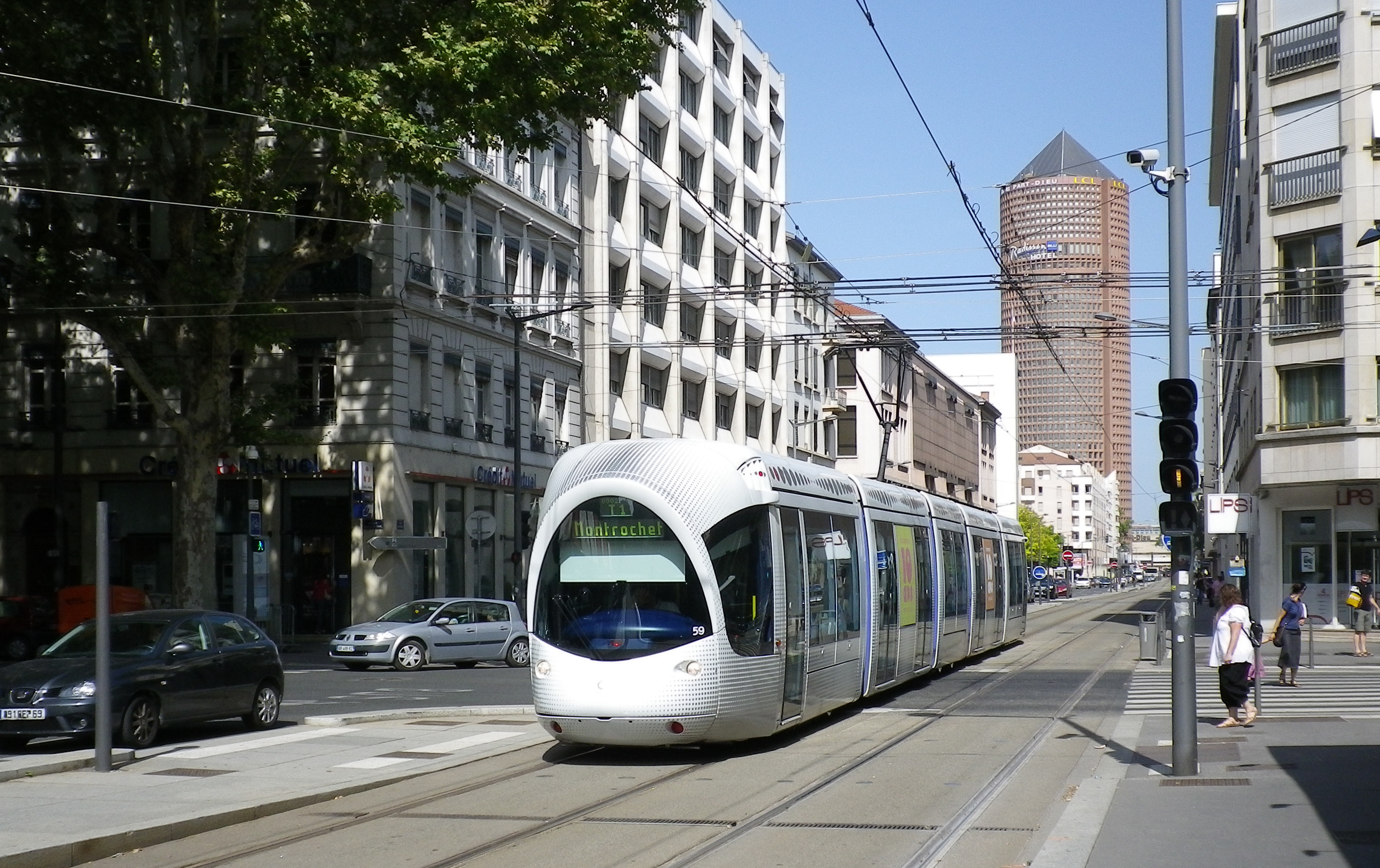 La rame 859 sur la ligne T1, arrive à la station Saxe-PréfecturePentax Optio H90